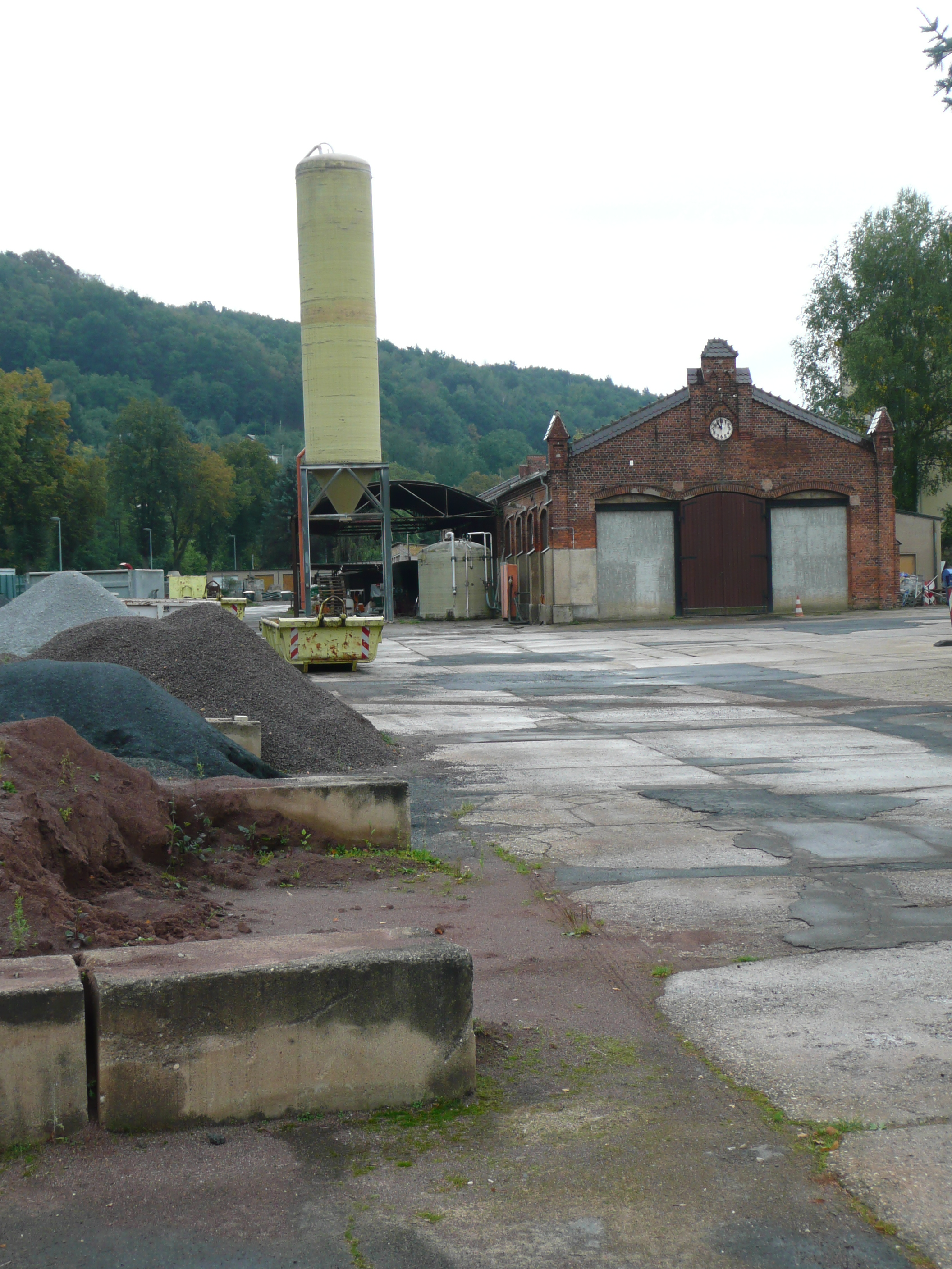 ehemaliger Straßenbahnhof Meißen-Triebischtal Jaspisstraße 11